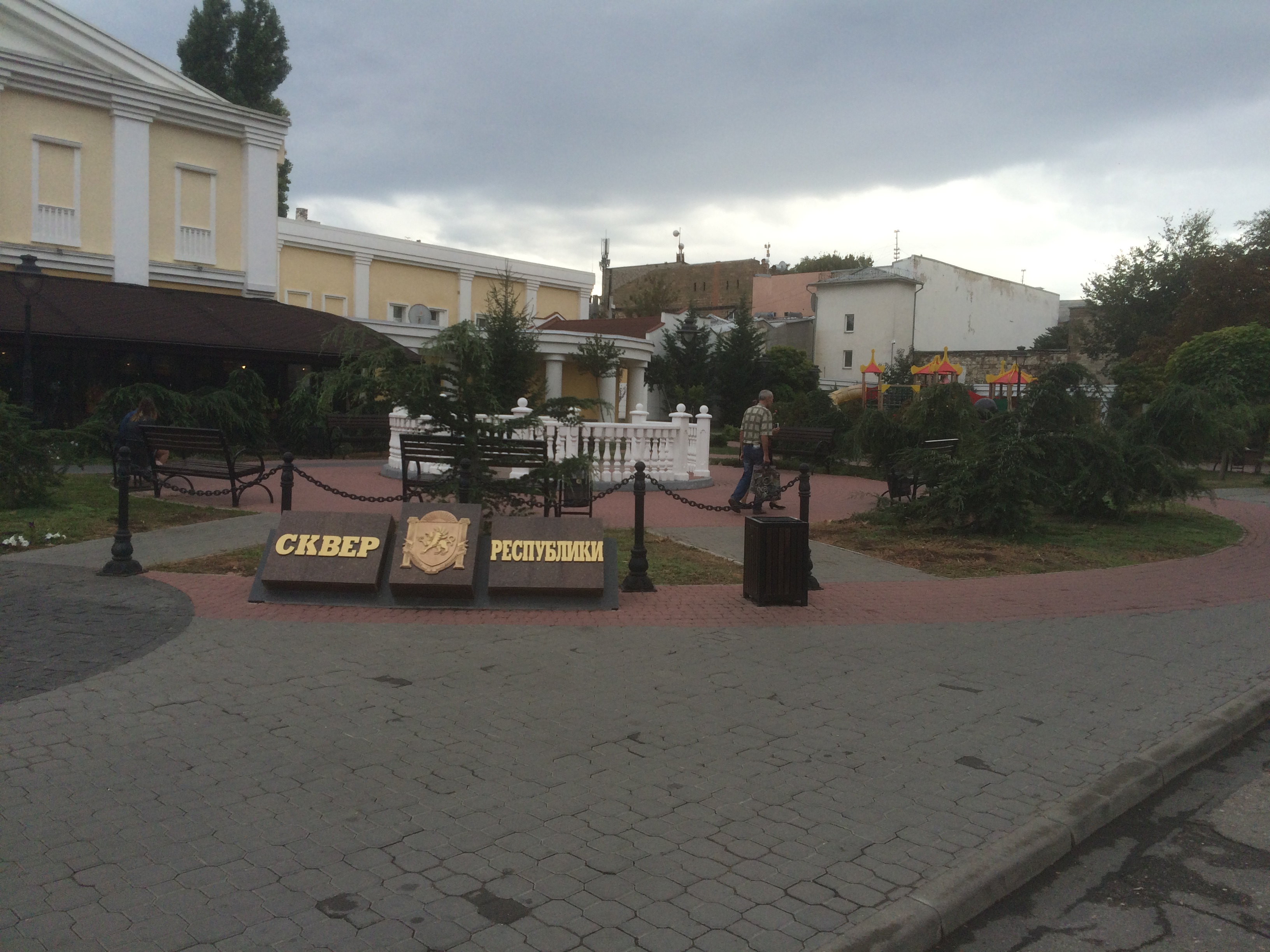 Сквер Республики (Симферополь, 2017)